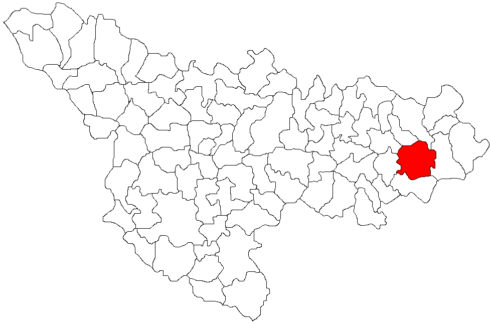 Fardea, Timis Licensing Categorie:Hărţi ale judeţului Timiş